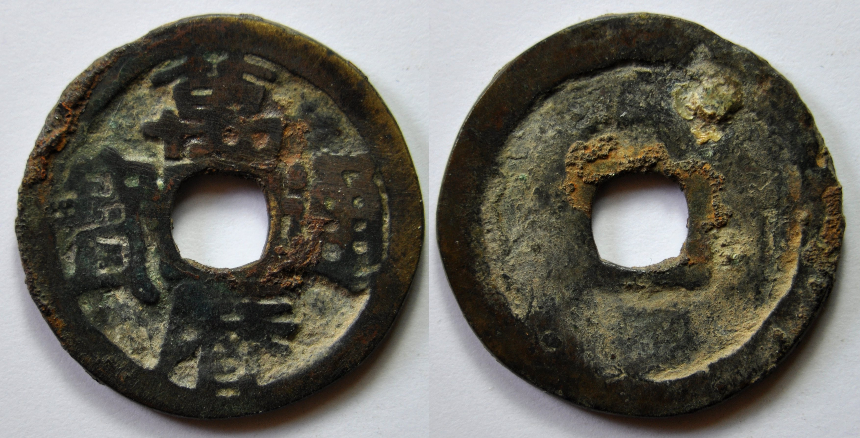 Une monnaie en laiton d'une sapèque (1 cash) de l'empereur Shen Zong (1573-1620) ère Wan Li de la dynastie Ming (1368-1644). La fabrication a commencé en 1576. La métal est composé normalement de 93,8% de laiton et 6,2% d'étain. A/ Wan Li tong bao (Monnaie courante de Wan Li) R/ Point à 2 heures Dimension : 24.4 mm Poids : 3,6 g. Référence : H20.144 Remarque : le point est épais, il n'a pas été limé. Indice de rareté : 11 (Commune d'après D.Hartill)